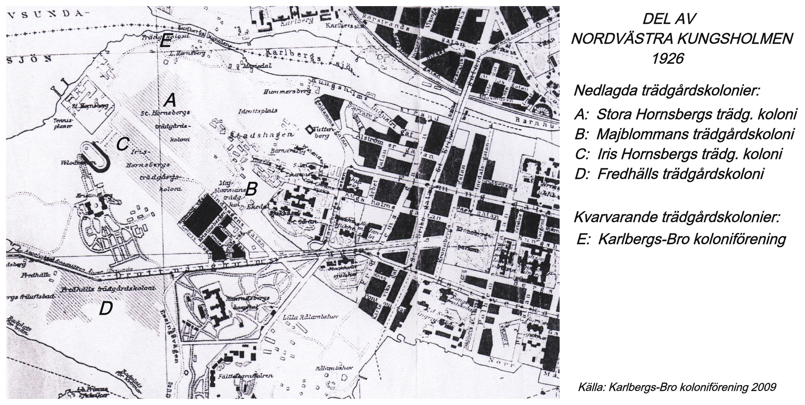 Ett utdrag från en karta som avser år 1926 och visar koloniträdgårdar på nordvästra Kungsholmen.